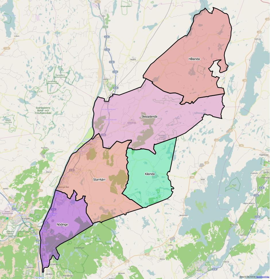 Distriktsindelningen i Ale kommun.